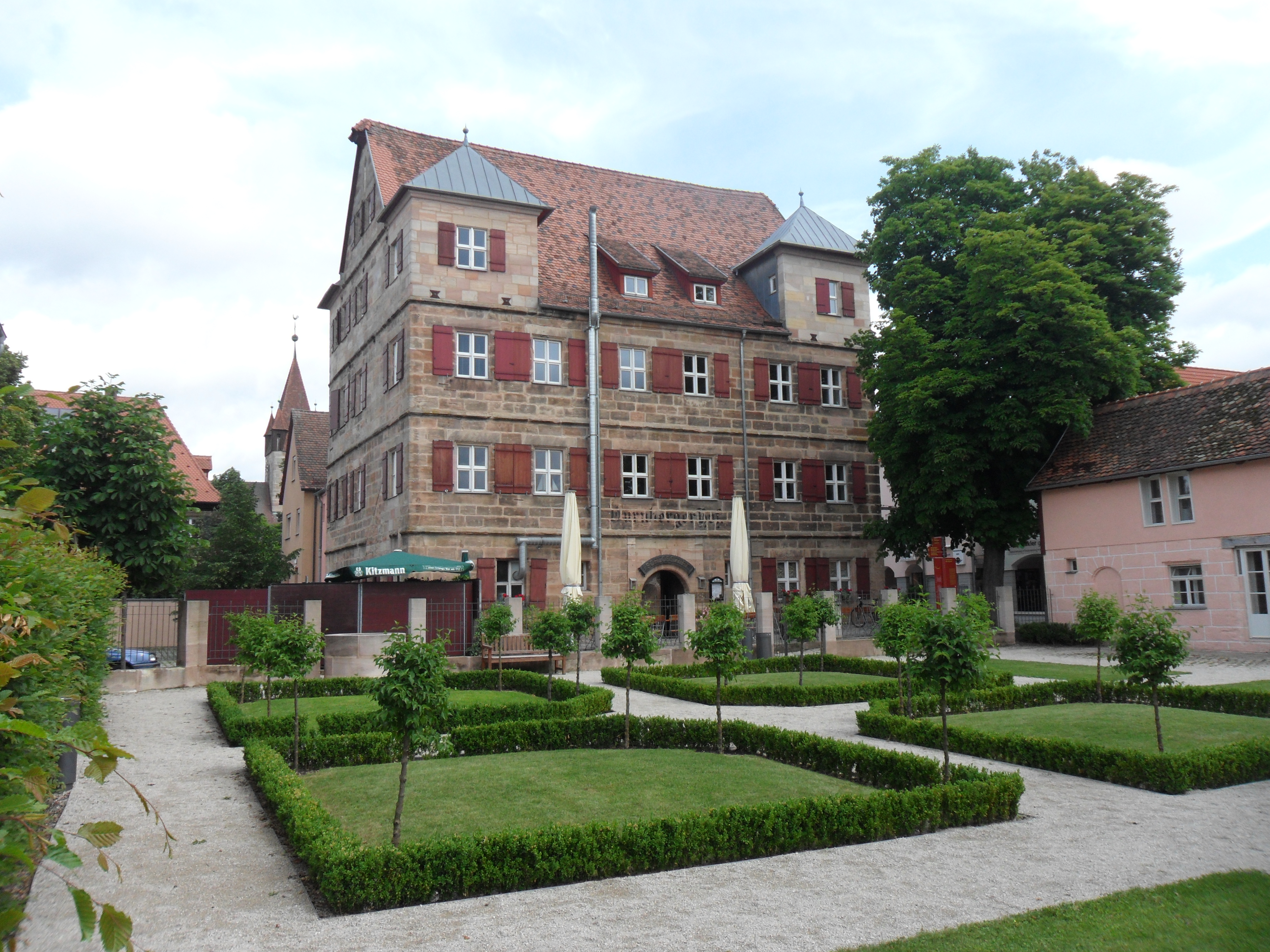 Das Tucherschloss in der Hauptstraße entstand in den Jahren 1591/92.